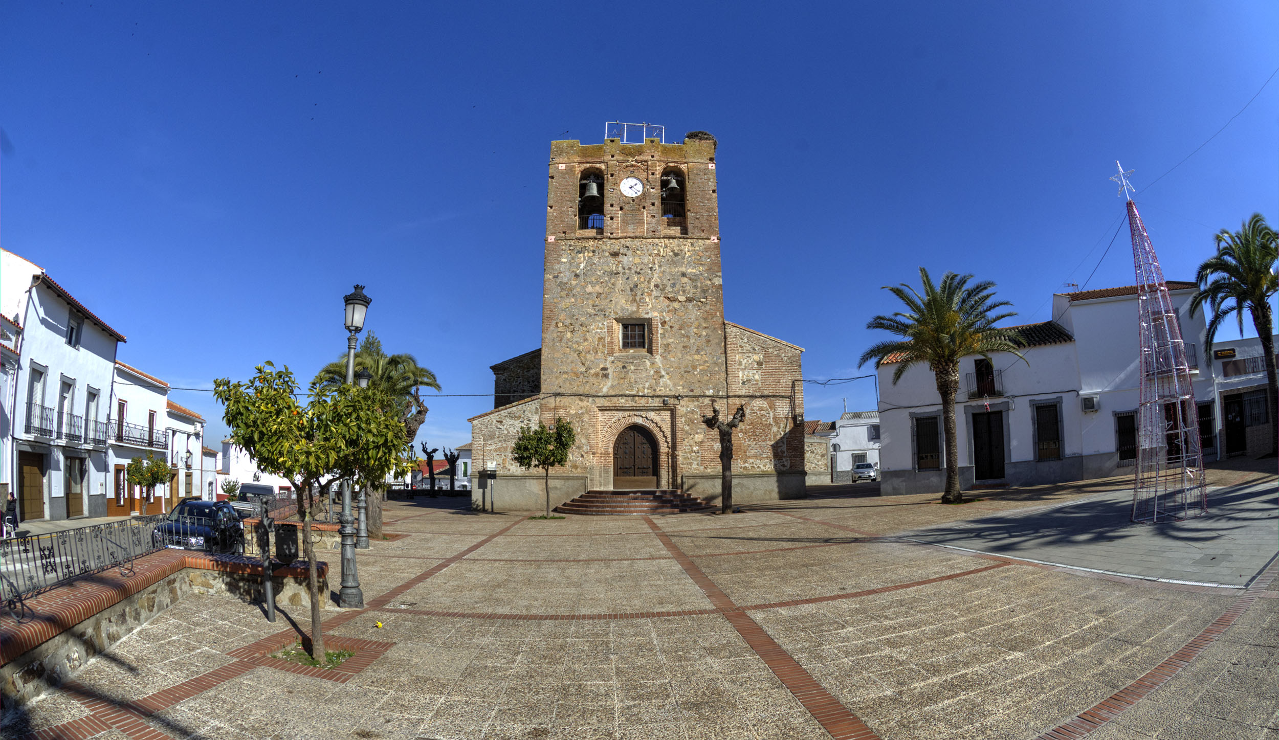 La iglesia del siglo XV de Nuestra Señora de los Ángeles, en Hinojosa del Valle, Badajoz.